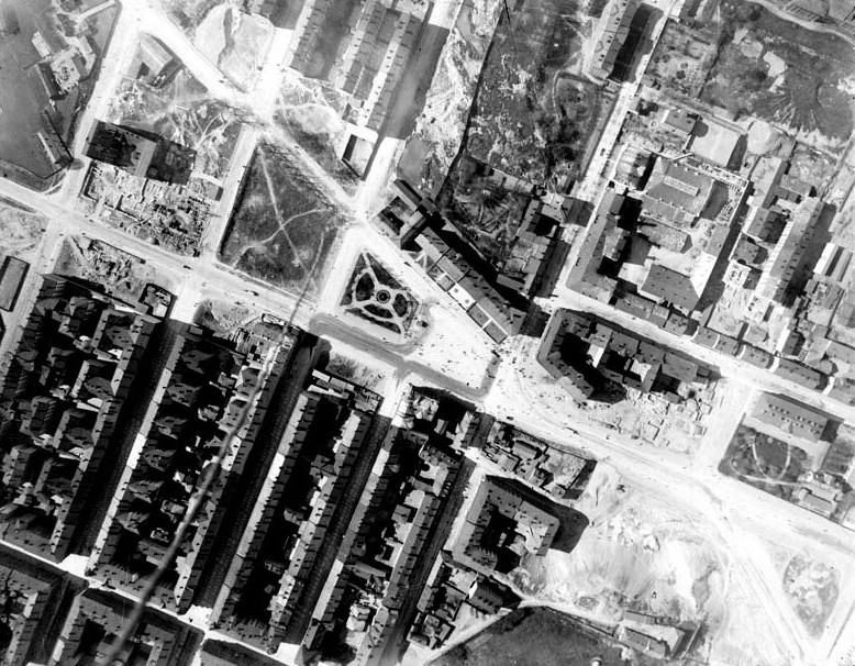 Flygbild från ballong från ca 300 m höjd - Ballon Captive - över området runt Odenplan